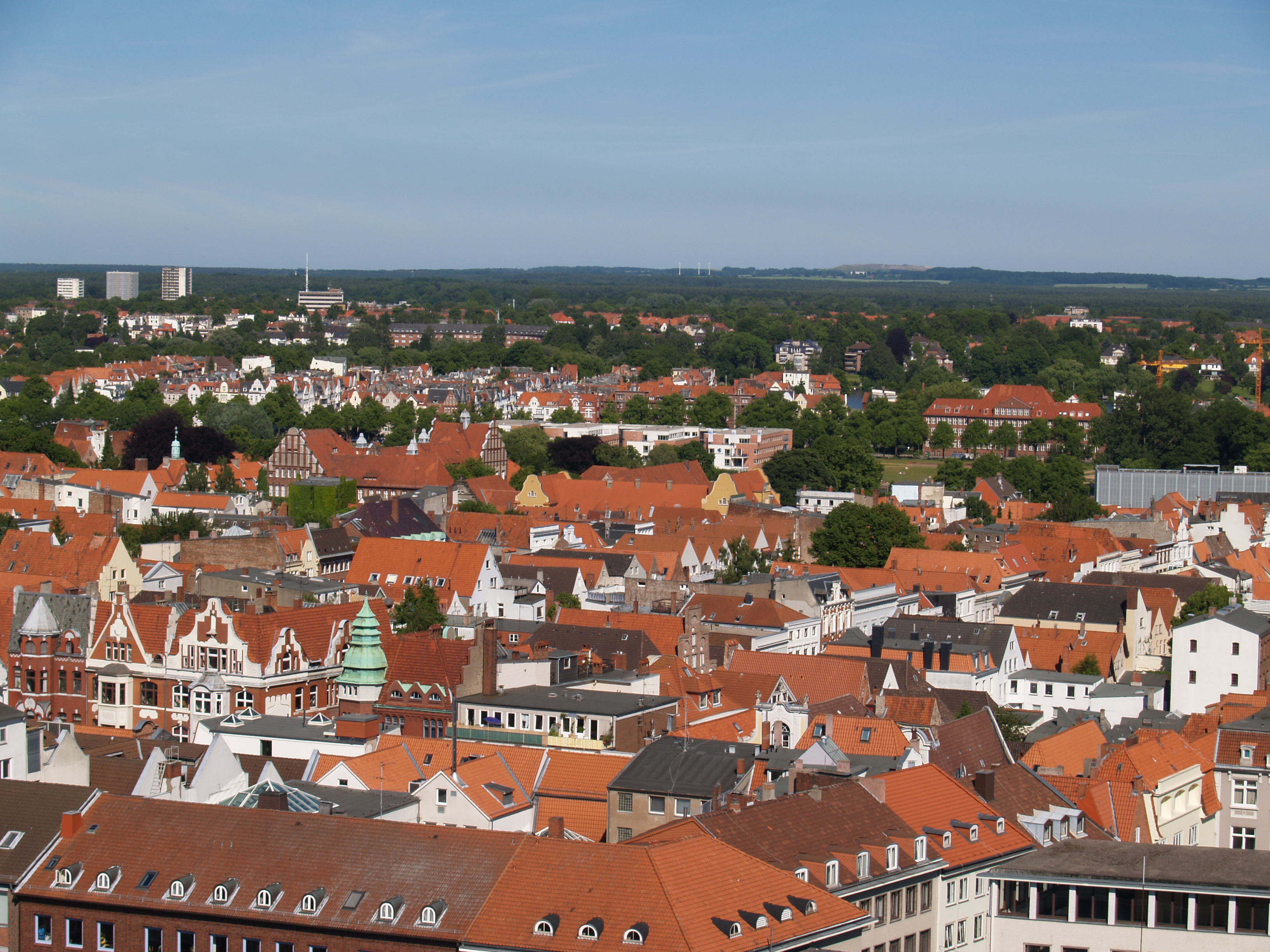 Blick über die Dächer von Lübeck von St. Petri aus nach Osten